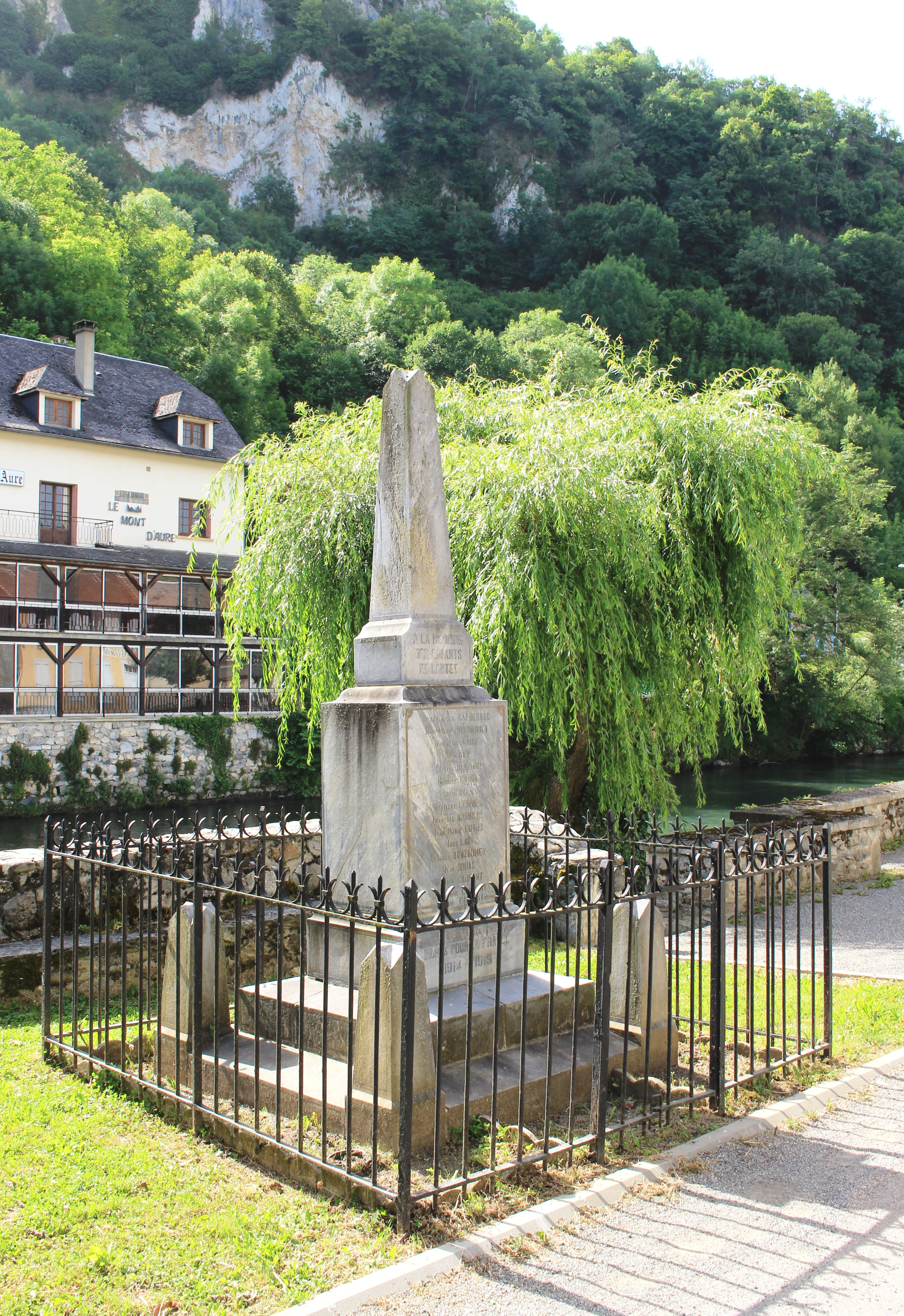 Monument aux morts de Lortet (Hautes-Pyrénées)